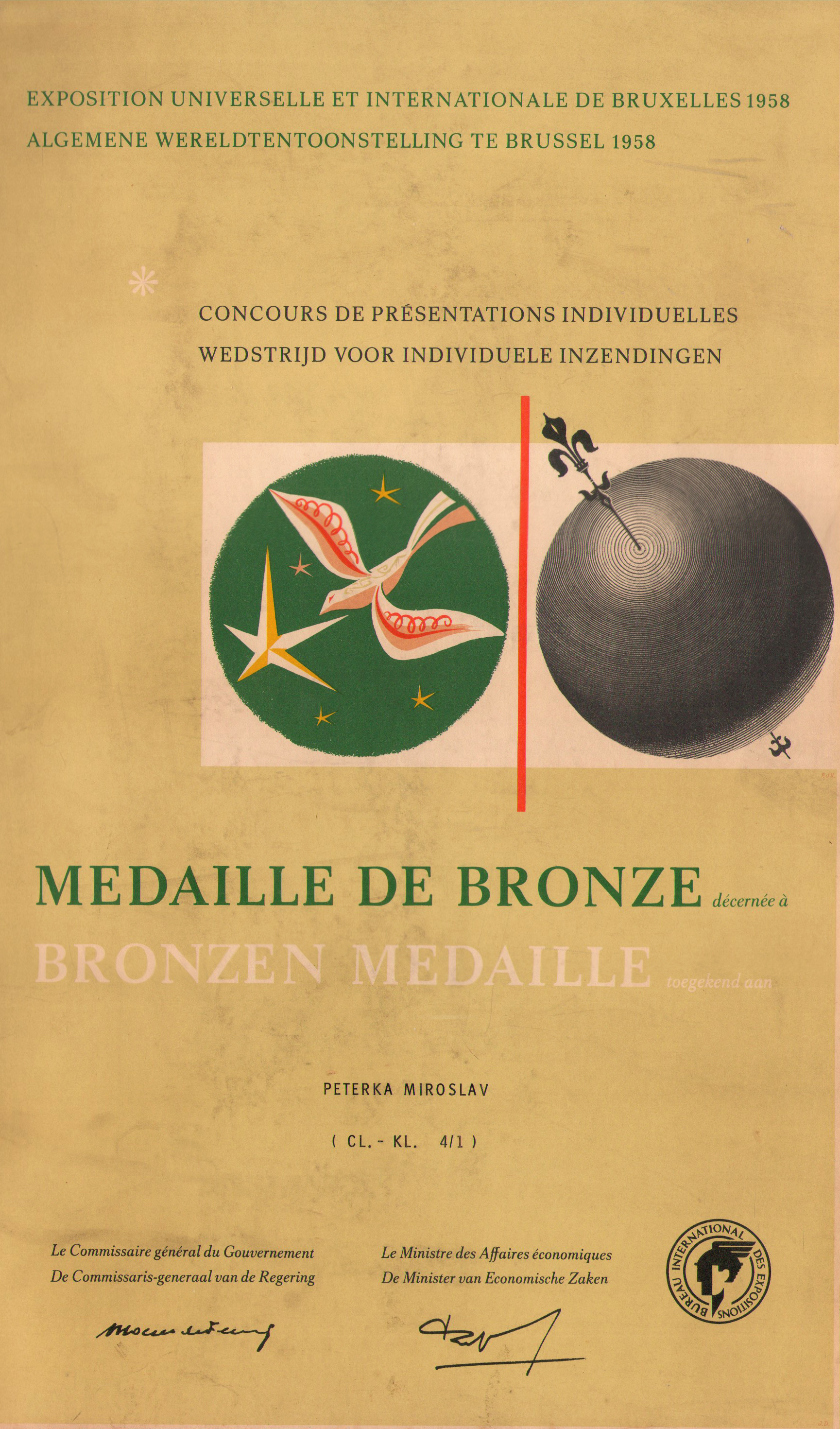 Toto ocenění získal Miroslav Peterka v roce 1958